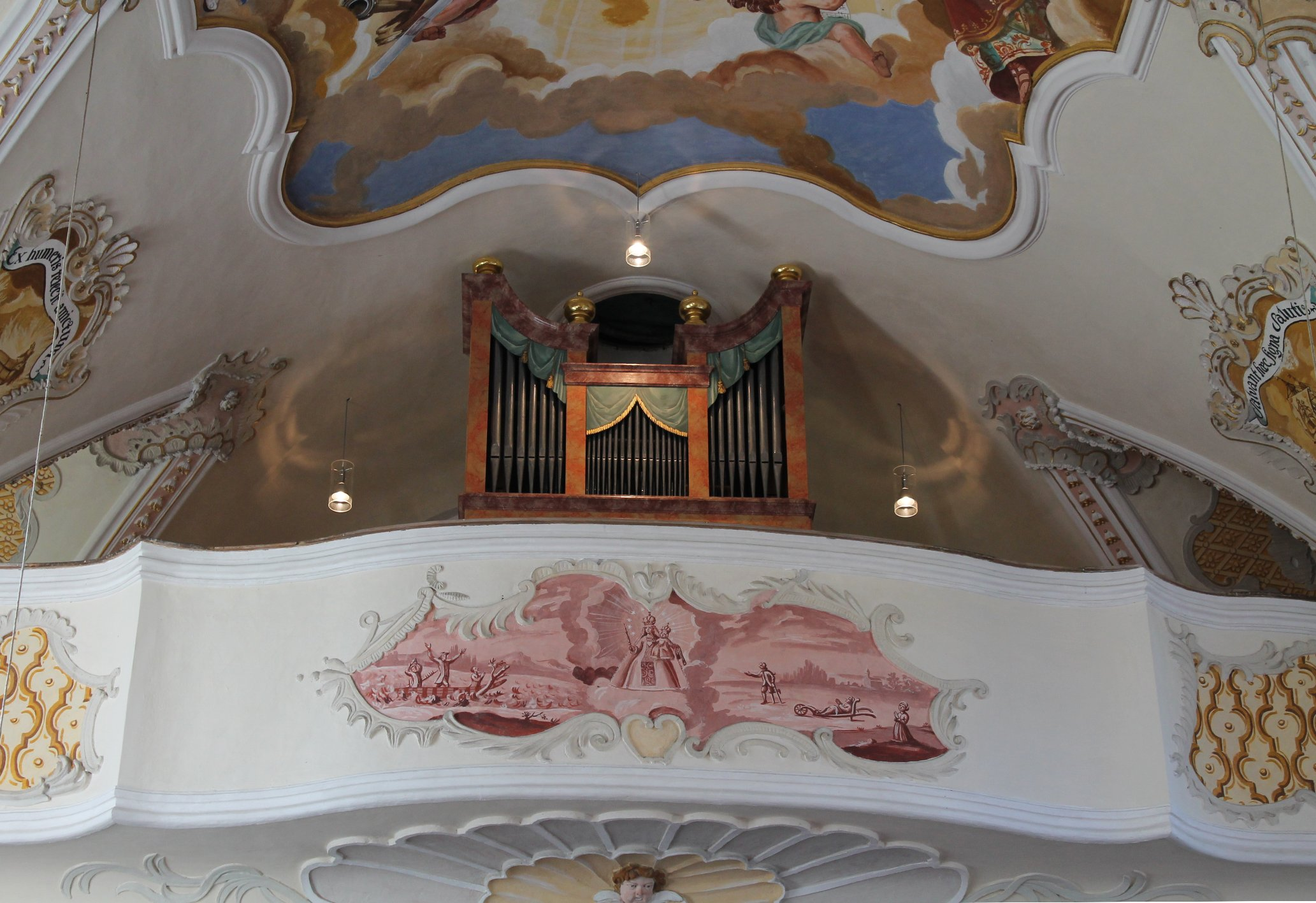 Orgel von St. Leonhard in Nußdorf am Inn (ca. 1800, J. Kölbl, I/7; 2010 restauriert von Alois Linder)